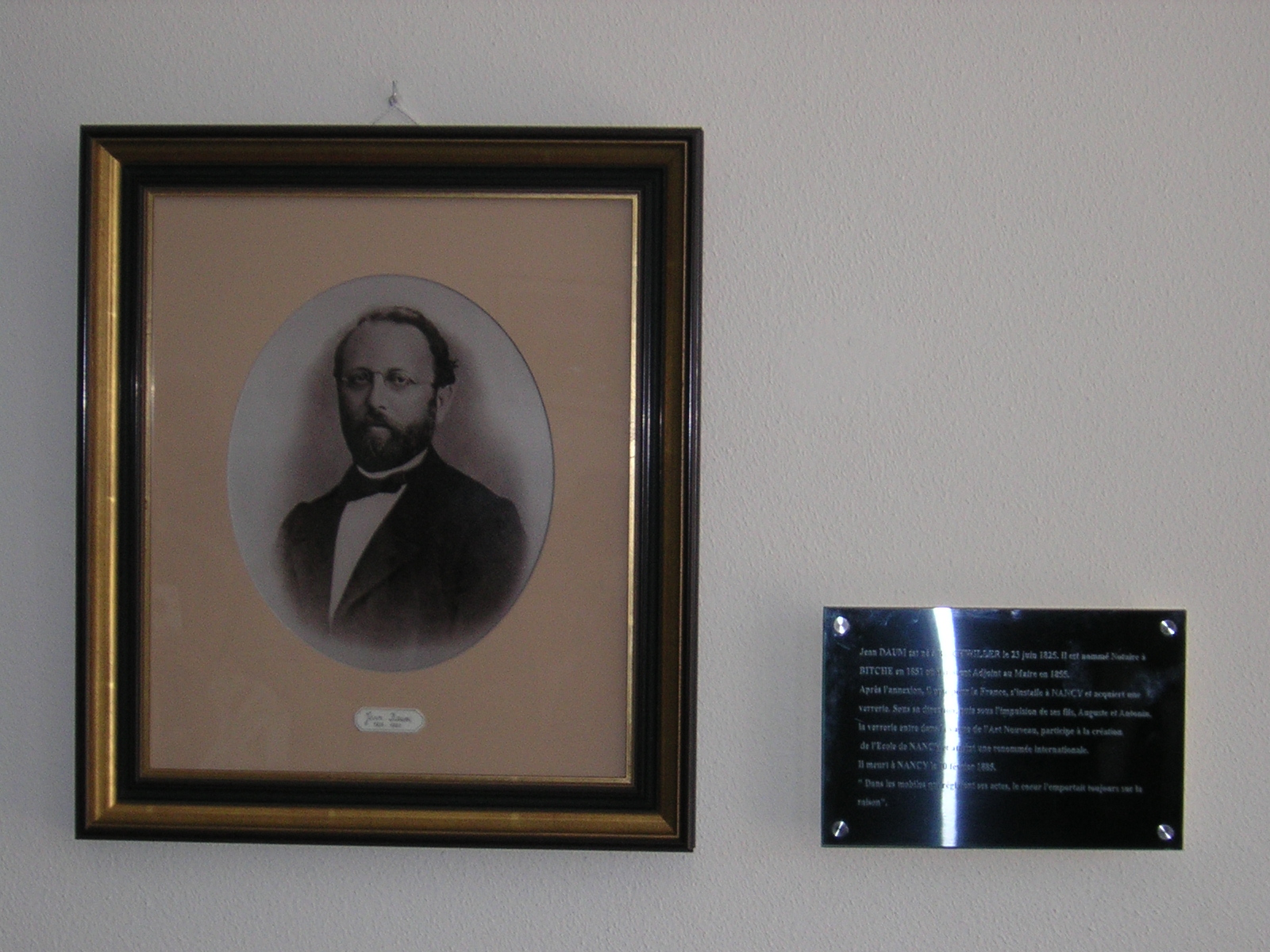 Image de Bitche : Jean Daum.